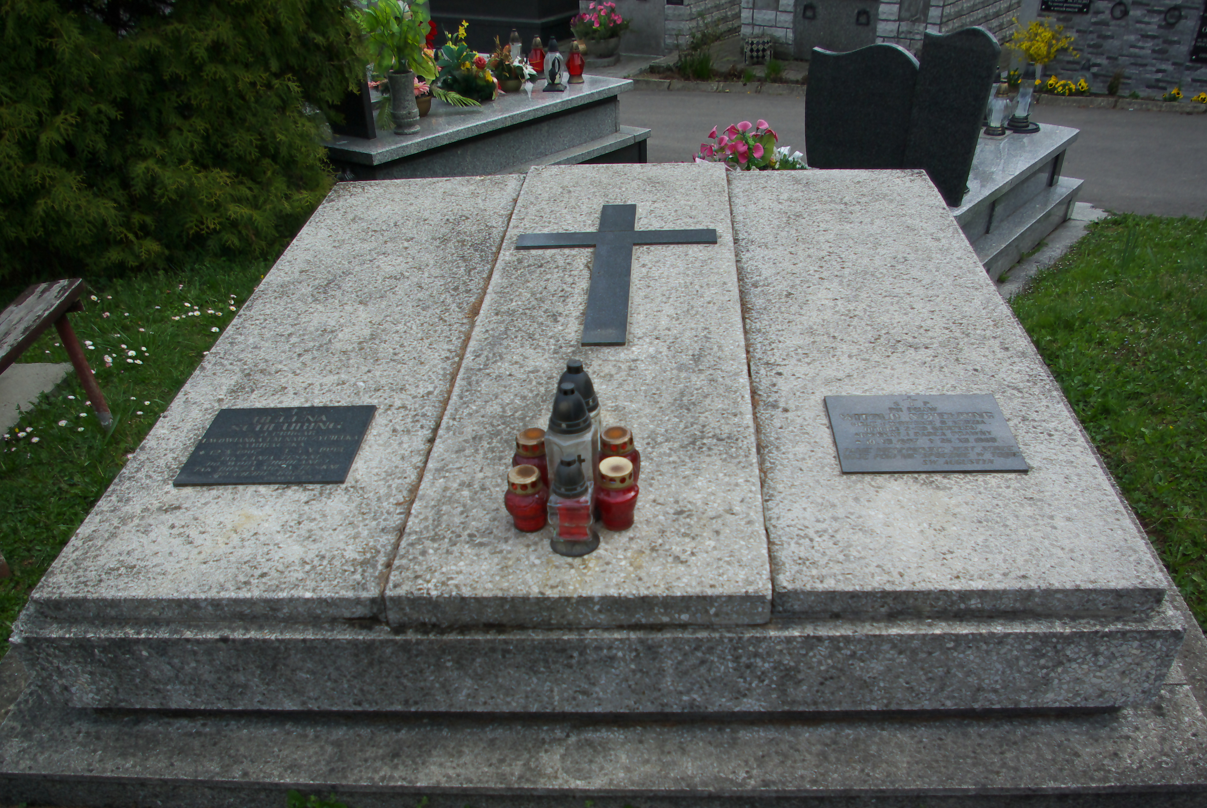 Grobowiec Heleny i Witolda Scheuring na Cmentarzu Centralnym w Sanoku